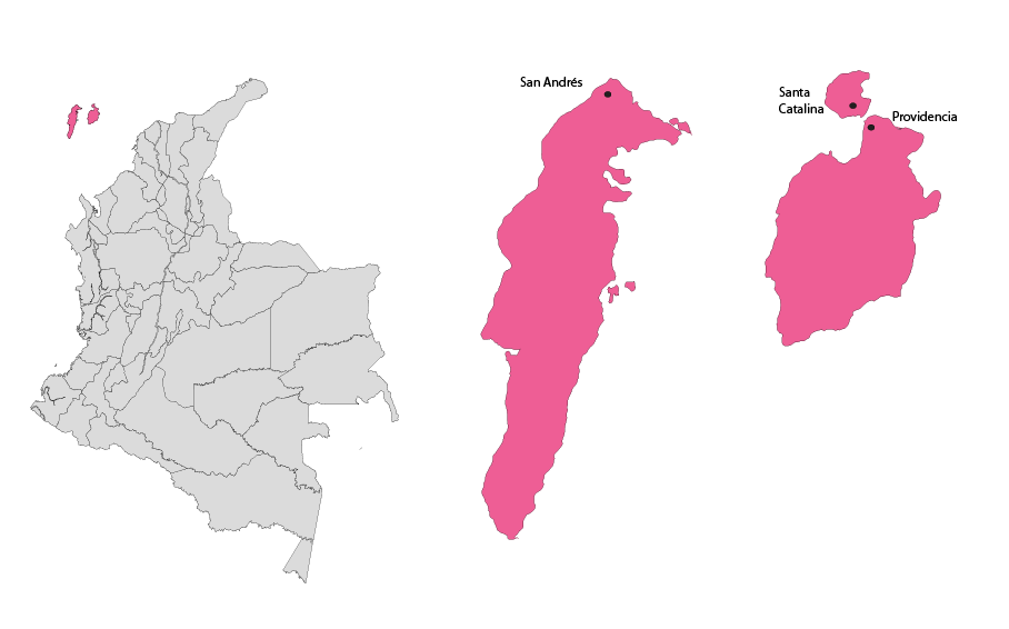 Eje musical Isleño